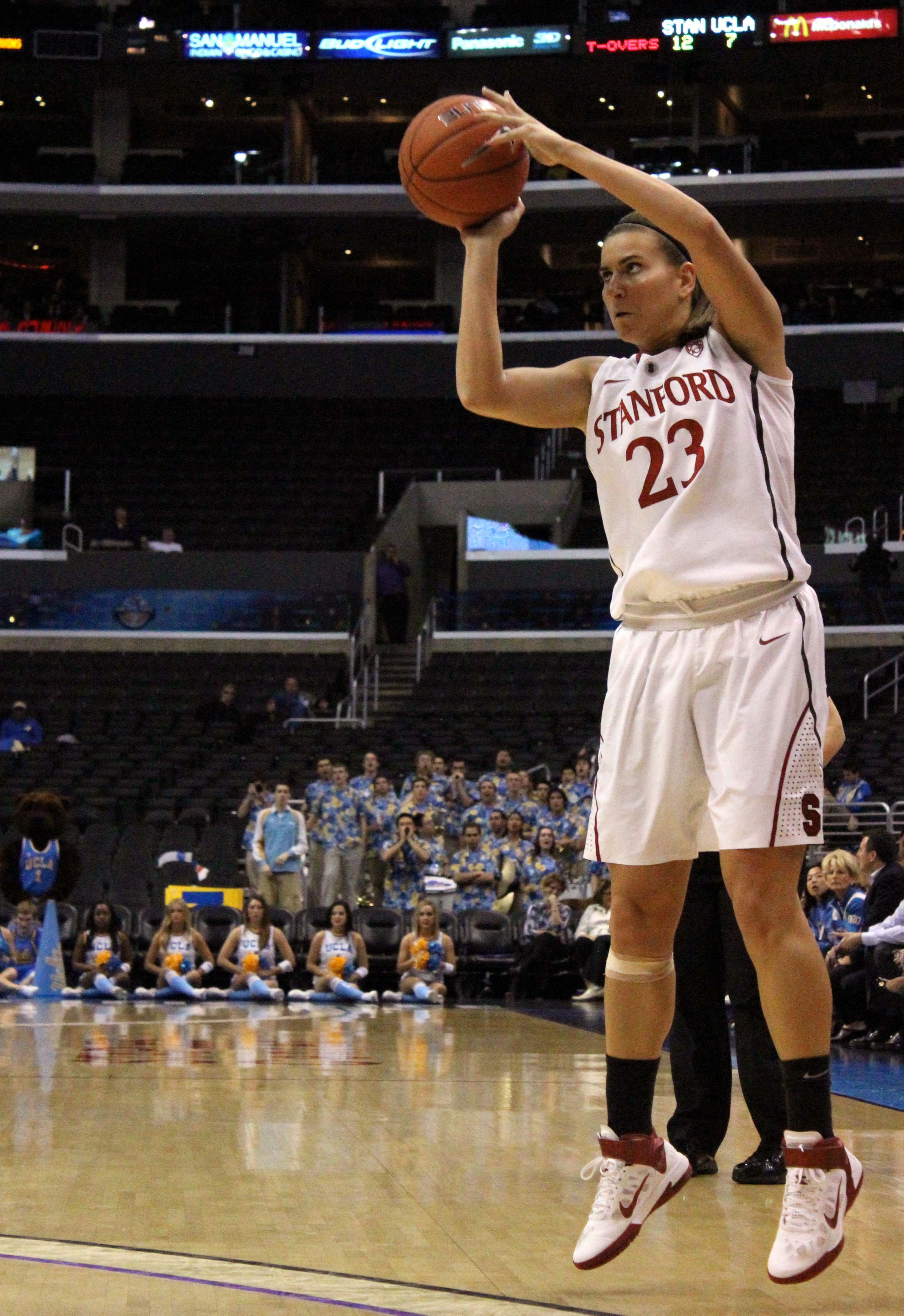 La basketteuse américaine Jeanette Pohlen de l'université de Stanford lors du Tournoi de la Pac 10